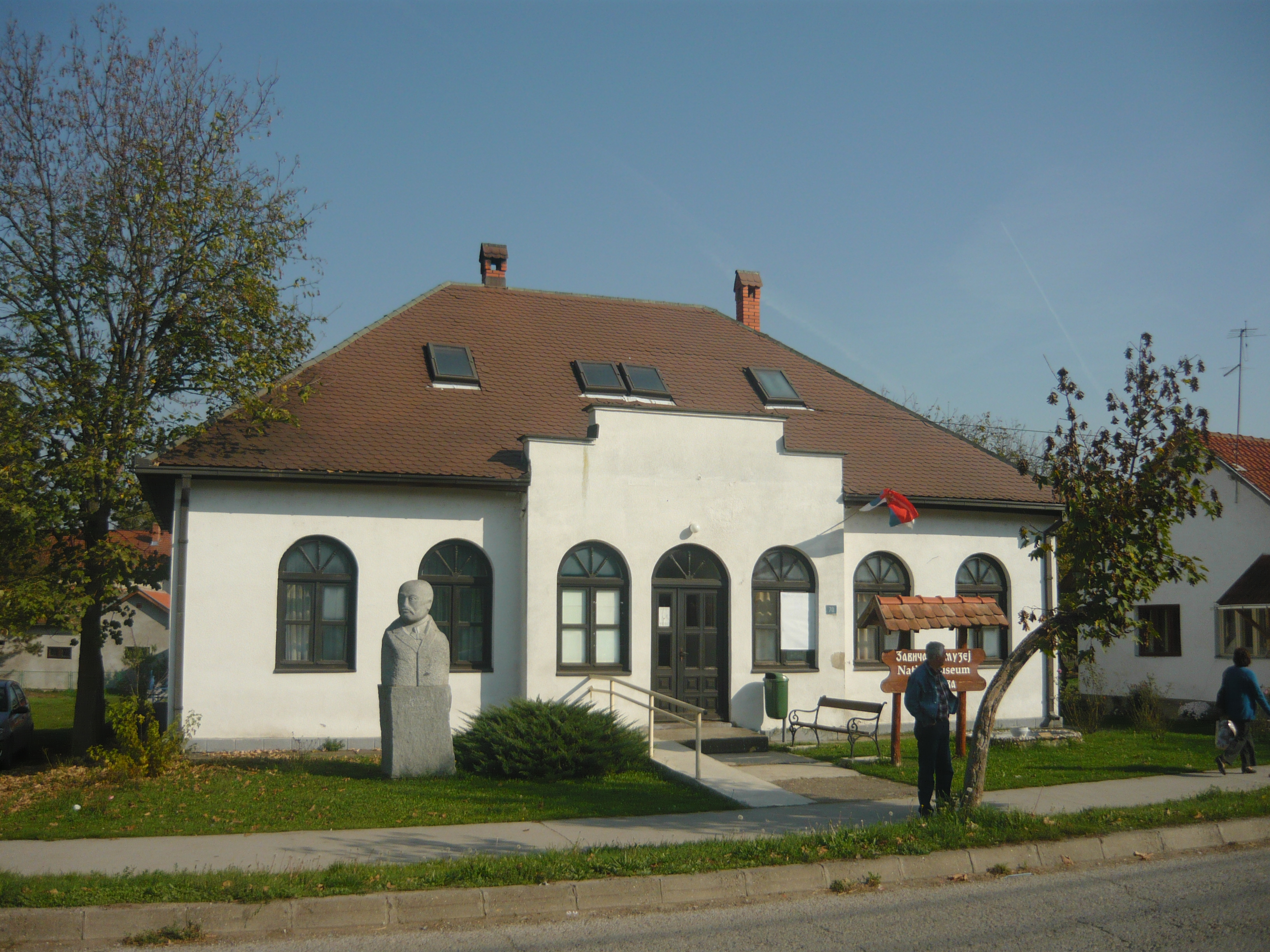 Садашњи Завичајни музеј